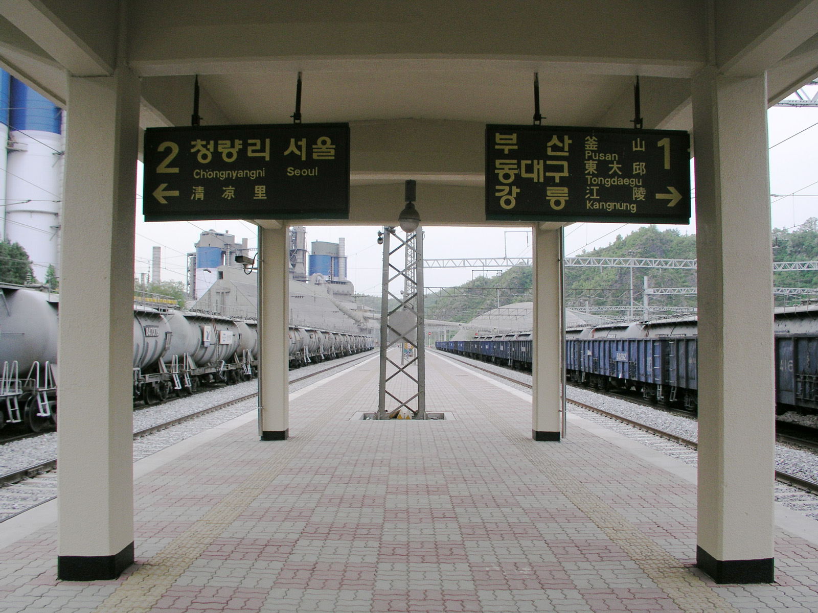 도담역 승강장